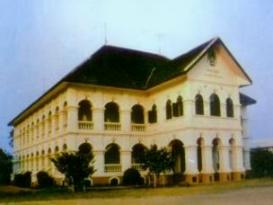 อาคารราชินูทิศ